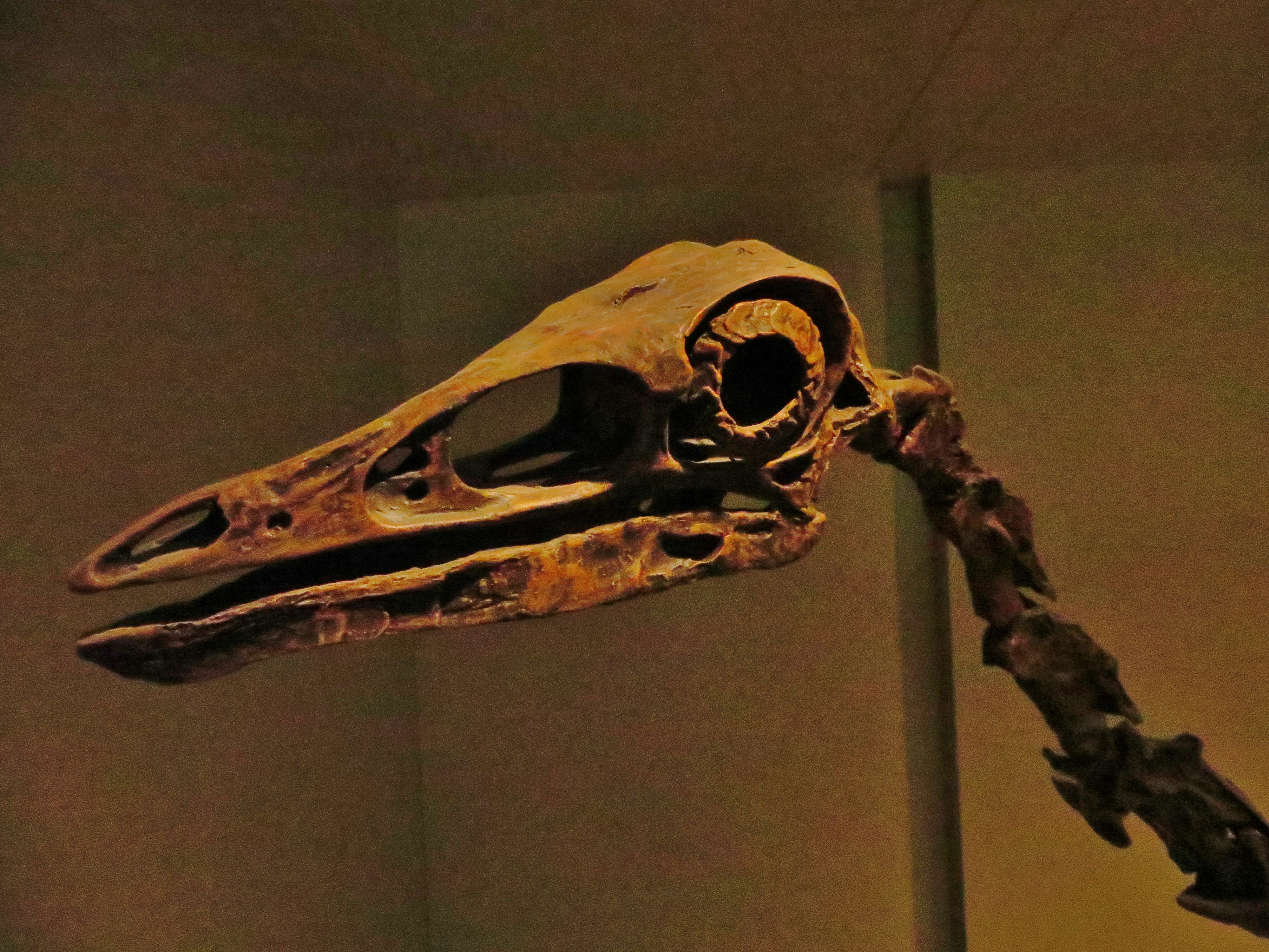 Fossil - Took The picture at Royal Belgian Institute of Natural Sciences, Brussels